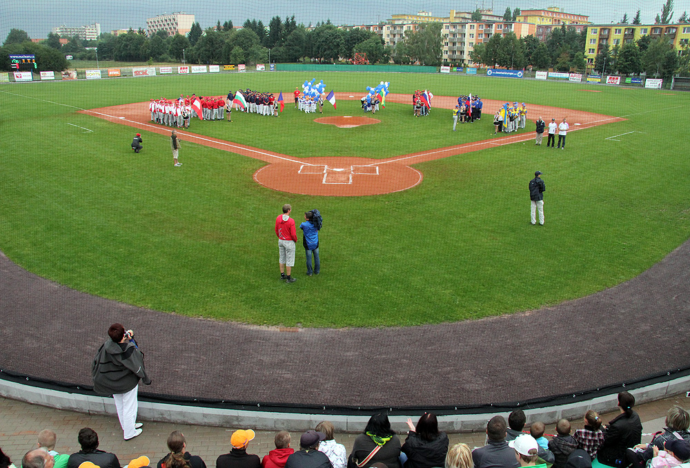 Zahajeni ME v Baseballu U21 v Třebíči Na Hvězdě v roce 2012